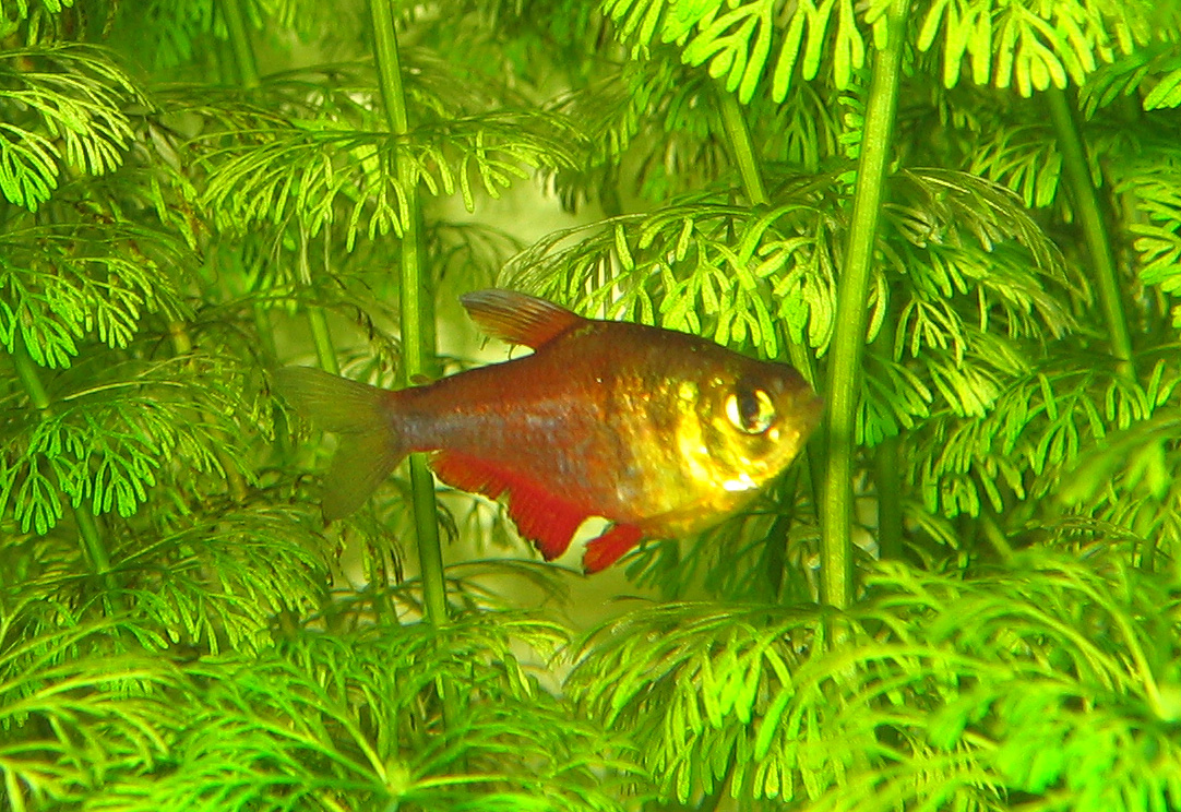 Flame tetra (Hyphessobrycon flammeus)